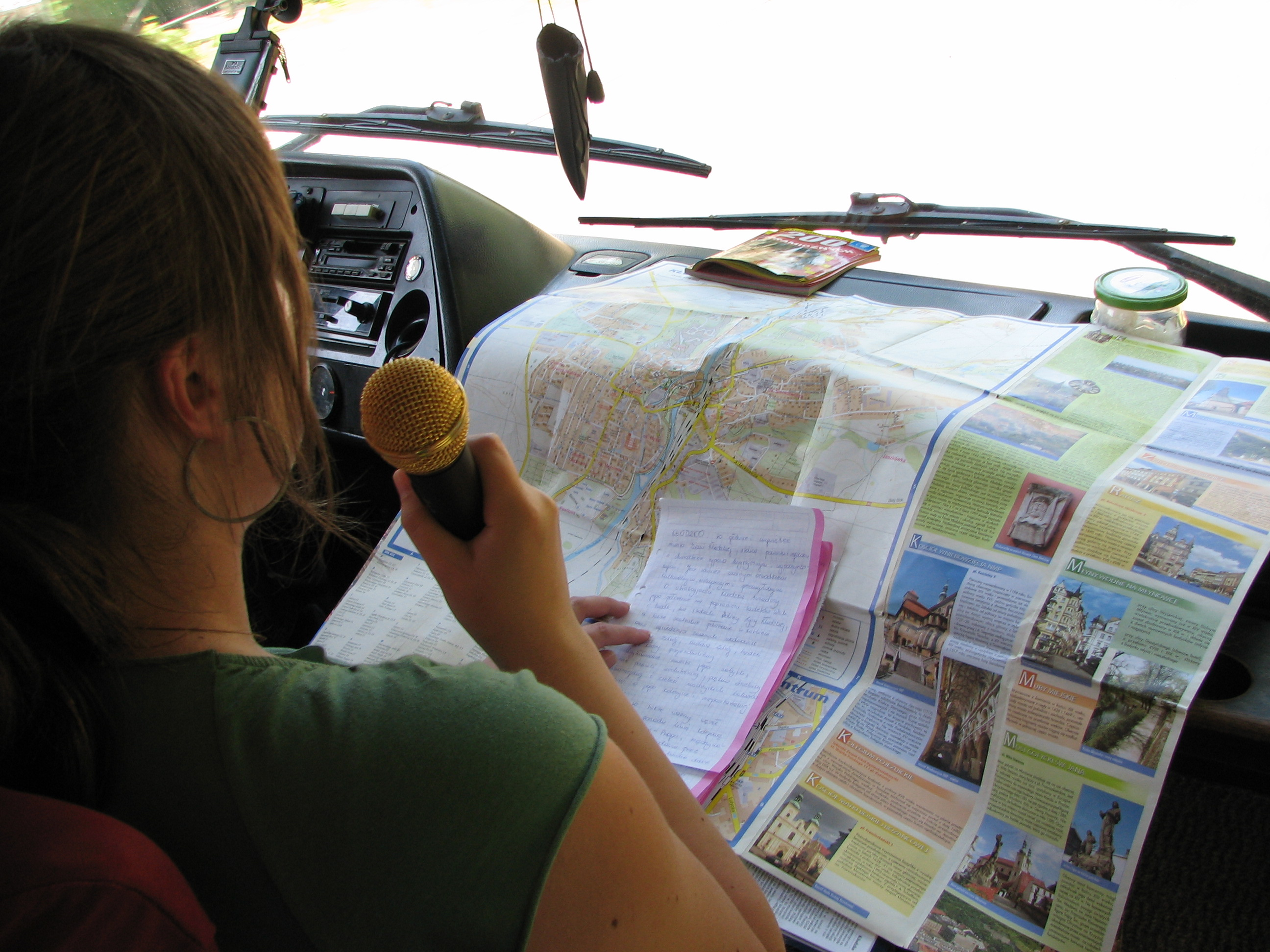 Studentka WSTH w Łodzi podczas krajoznawczych ćwiczeń terenowych